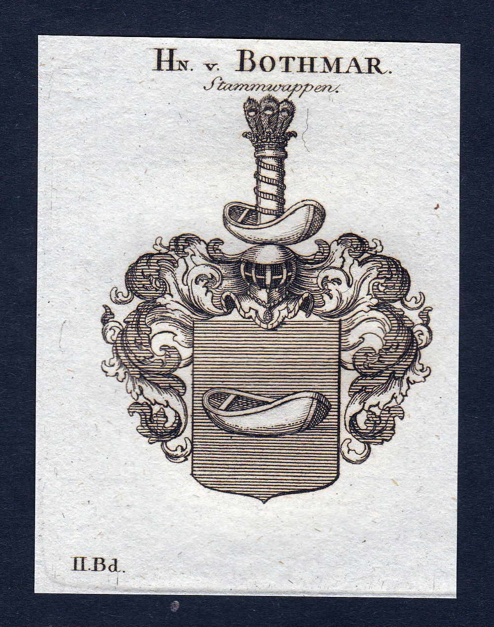 Originalwappen der Familie von Bothmer aus einem historischen Lexikon.